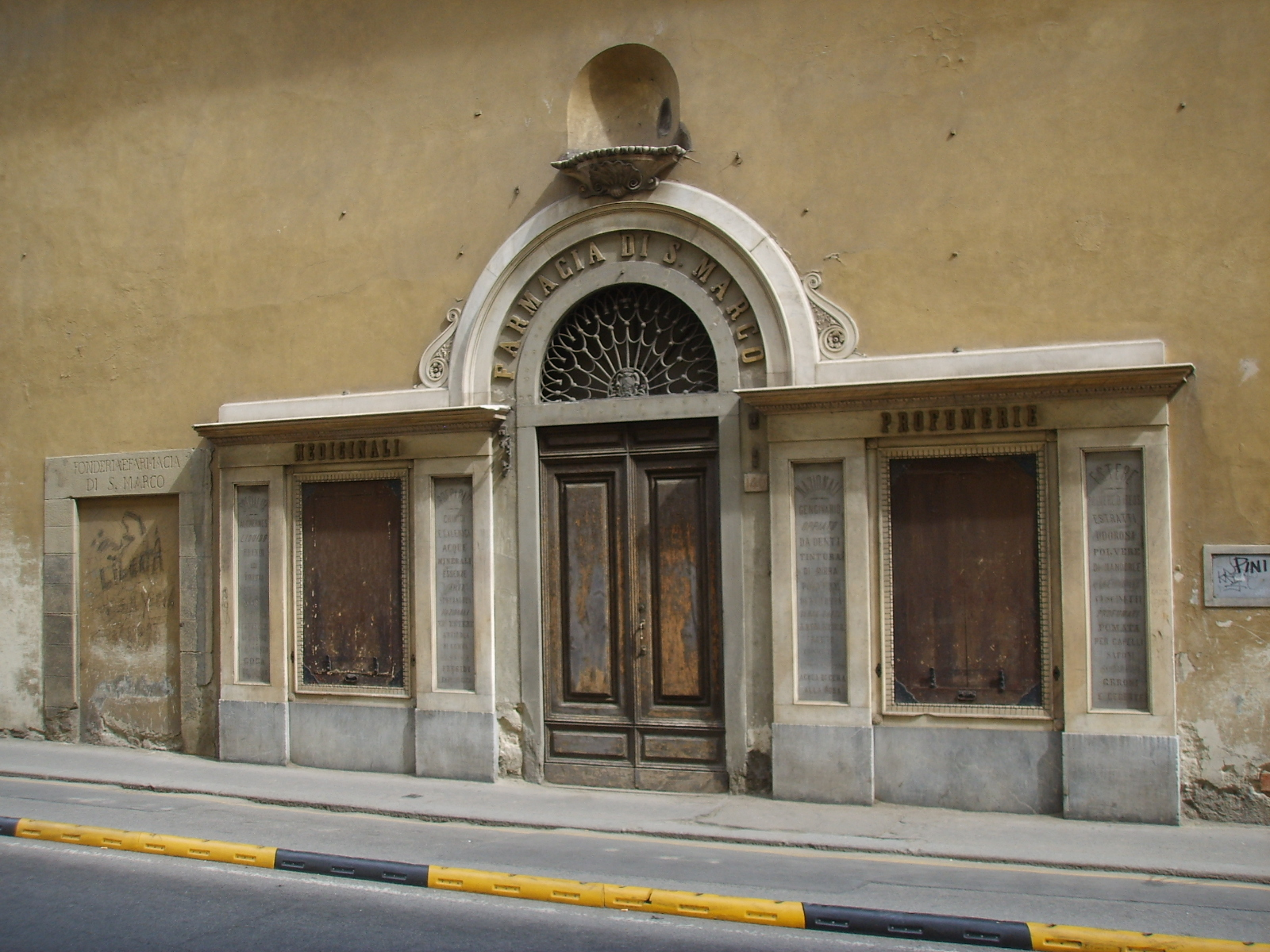 Farmacia_di_San_Marco florence italy